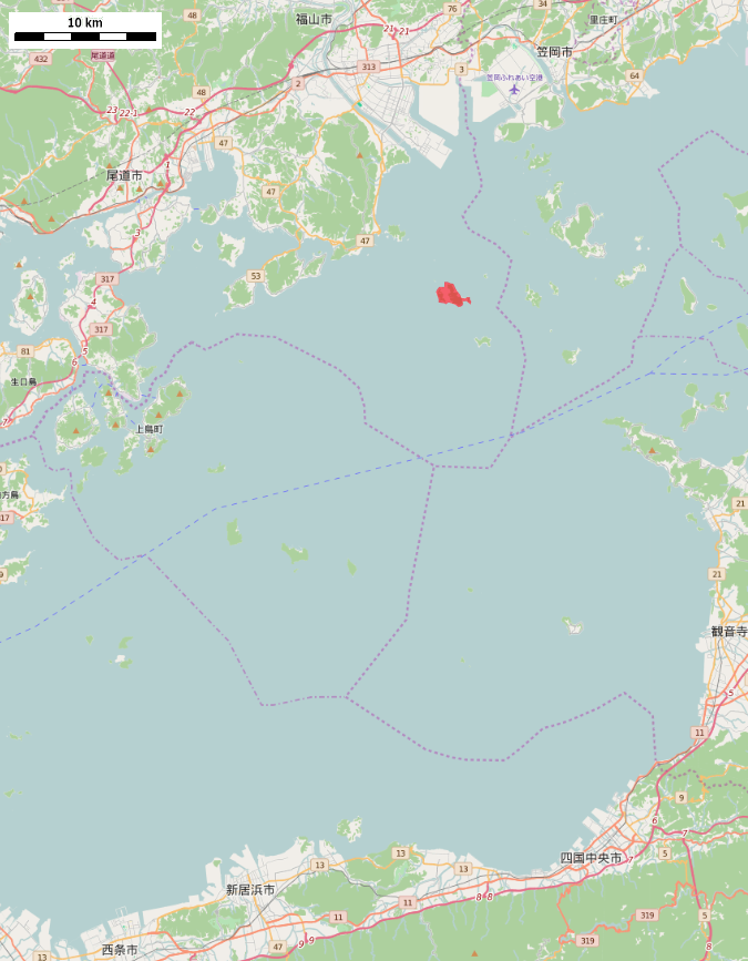 広島県福山市の走島周辺 This map may be incomplete, and may contain errors. Don't rely solely on it for navigation.